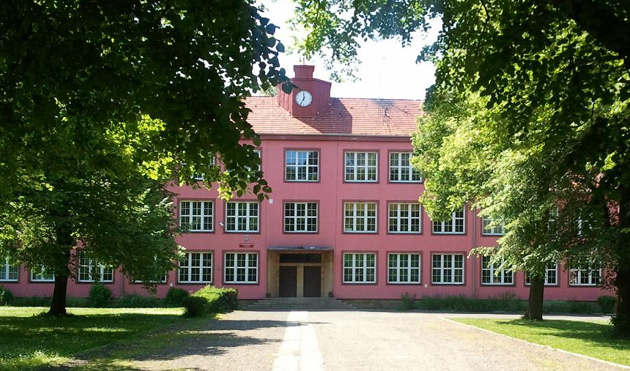 III LO w Wałbrzychu, ul. Henryka Jordana 4